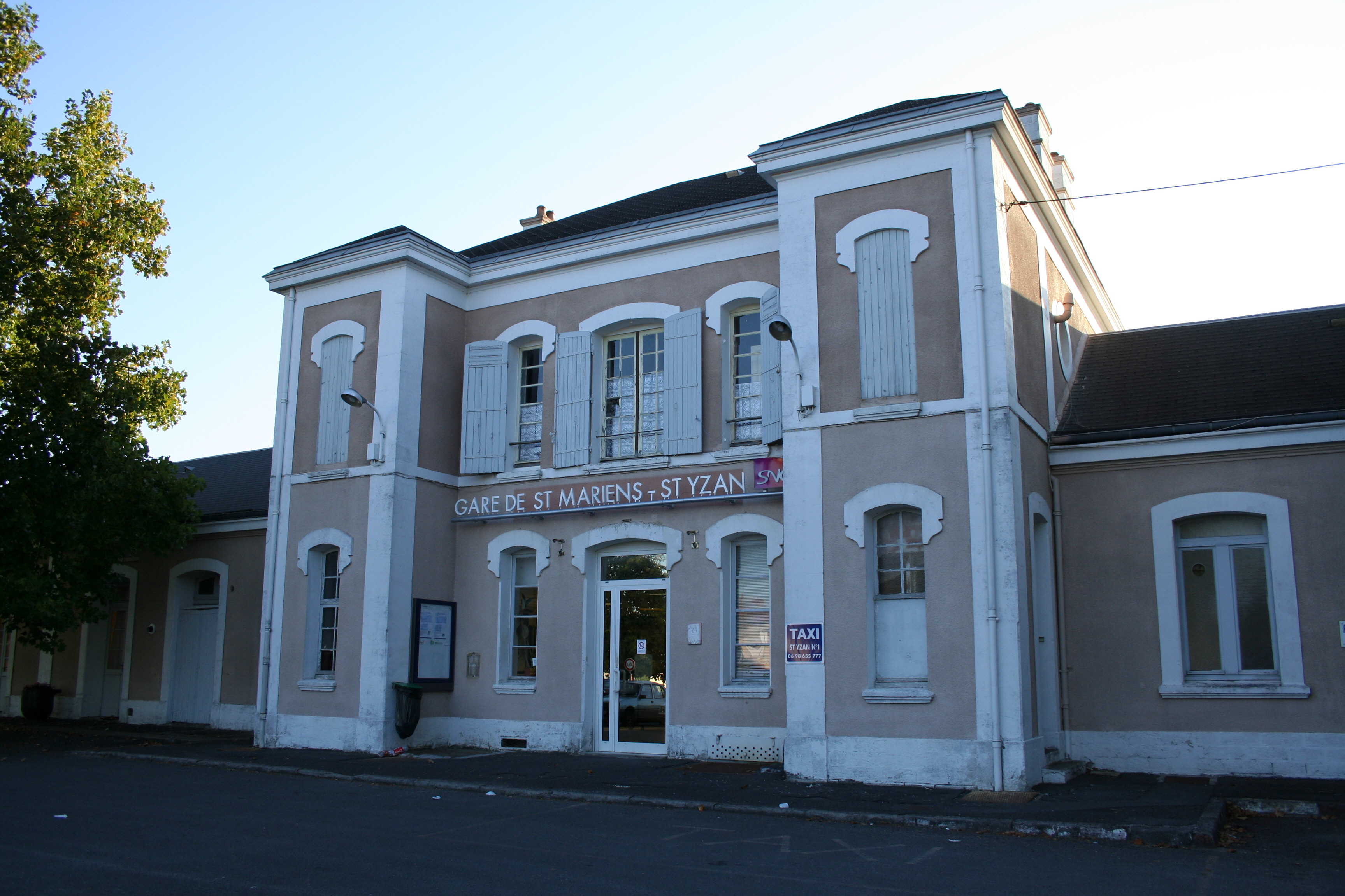 Façade de la gare